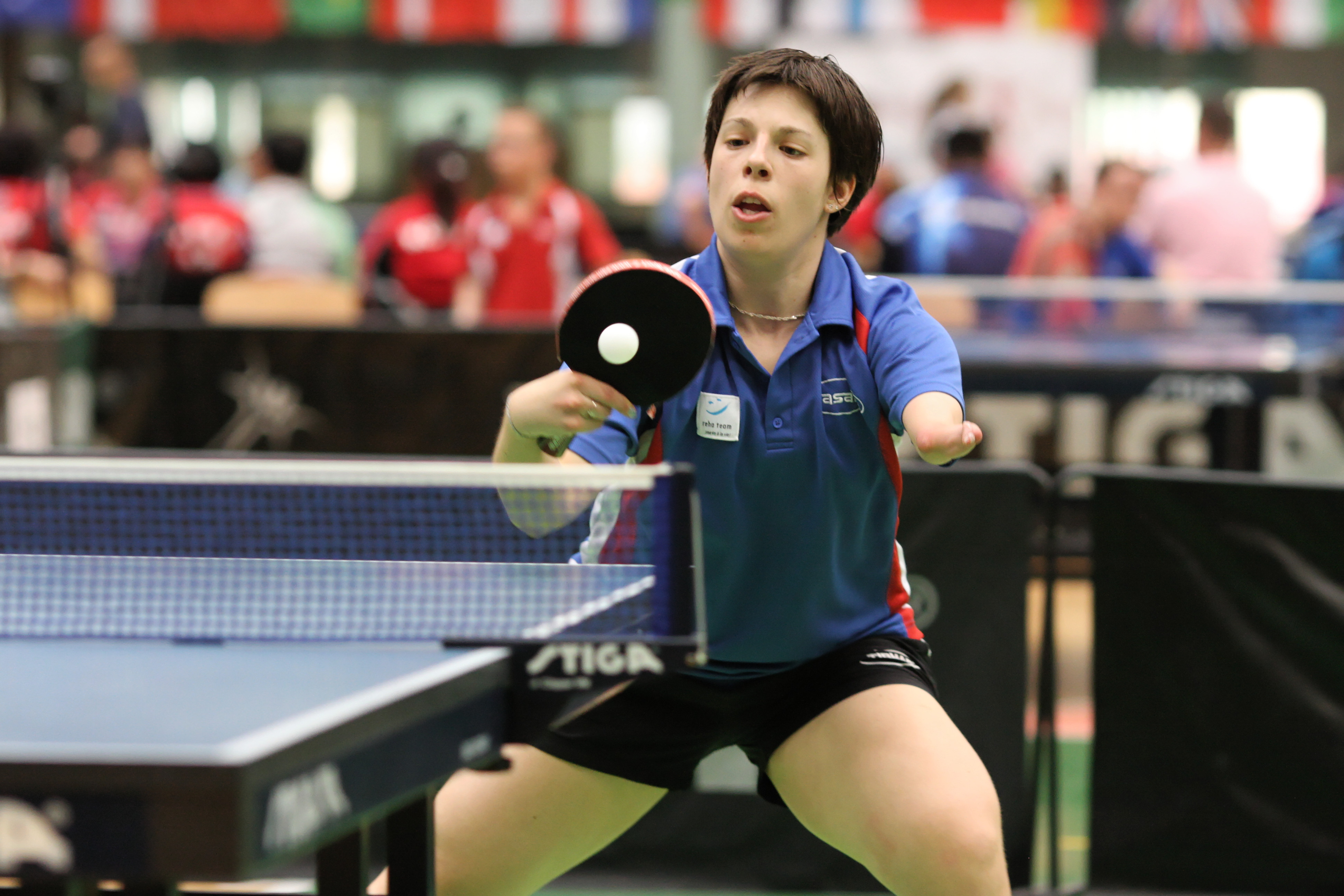 Audrey Le Morvan (FRA)